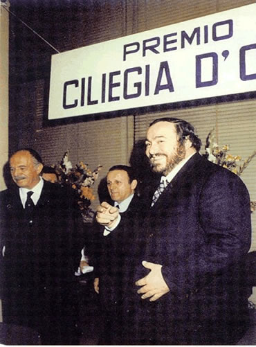 Luciano Pavarotti riceve il premio Ciliegia d'Oro nel 1982